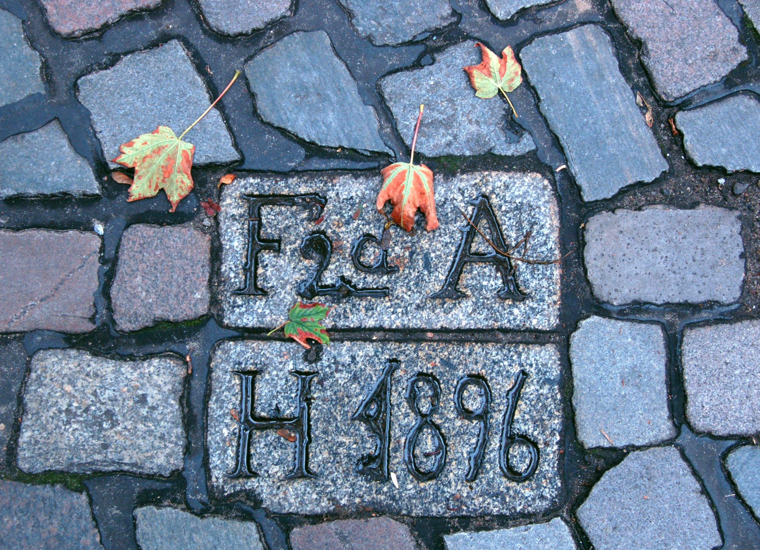 Alter Grenzstein zwischen den einst getrennten Großstädten Altona und Hamburg von 1896, der heute noch in der Brigittenstraße, die nun im Hamburger Stadtteil St. Pauli liegt, gepflastert ist. This is a photograph of an architectural monument.